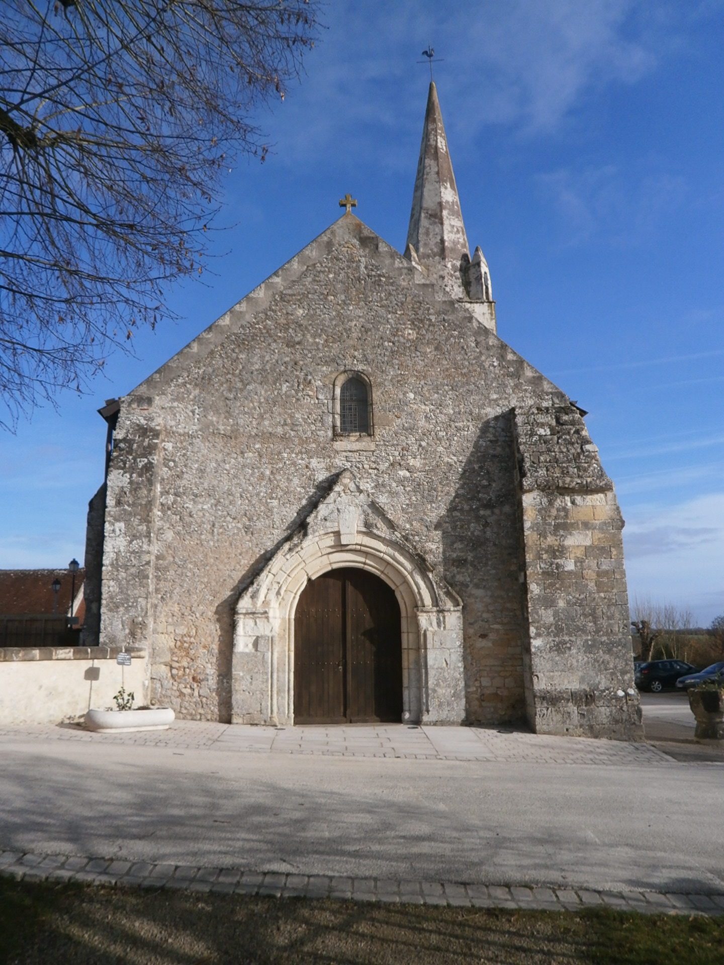 Saint-Quentin-sur-Indrois - la porte méridionale de l'église